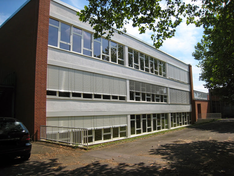 Nebenstelle des Erich-Gutenberg-Berufskolleg in Köln-Stammheim